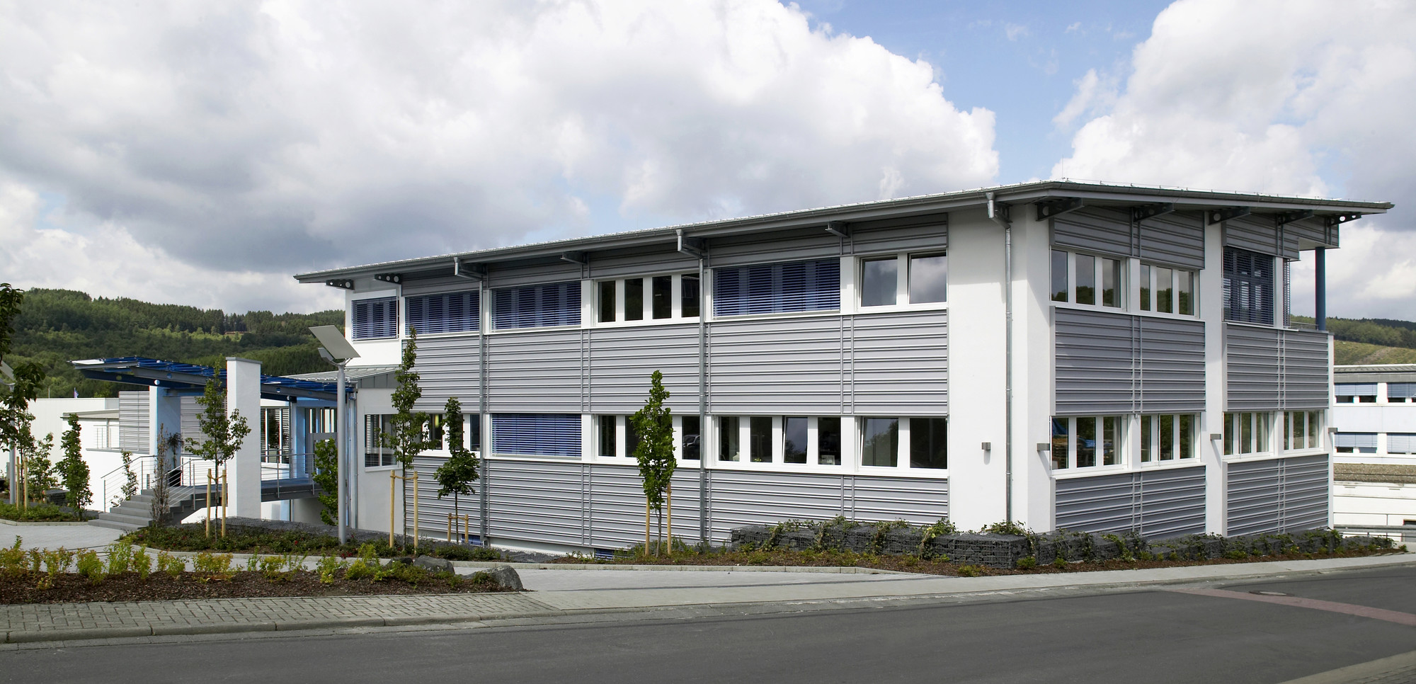 Kettenbach Unternehmenssitz in Eschenburg